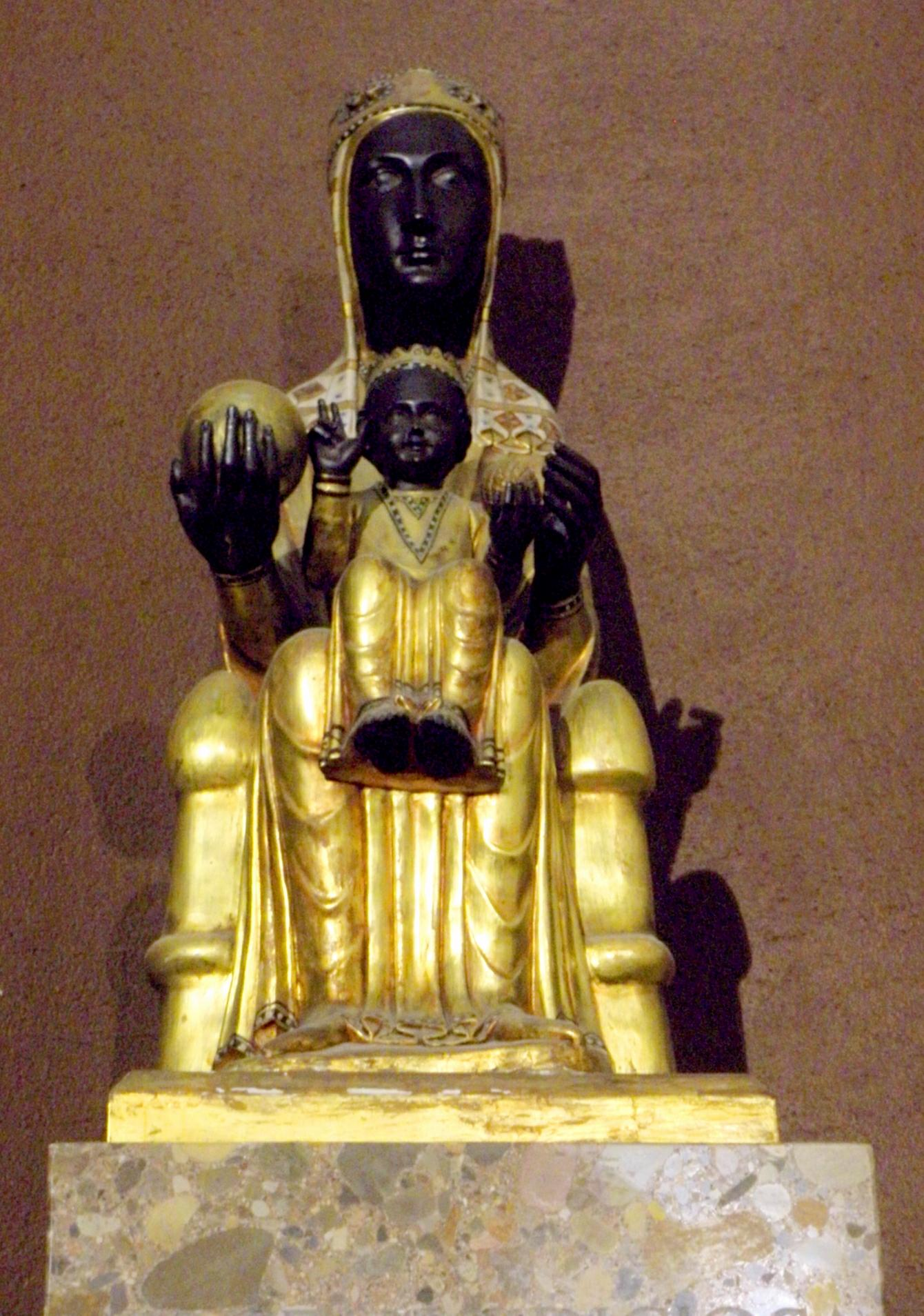 Virgen de Montserrat, en la iglesia de Belén de Barcelona